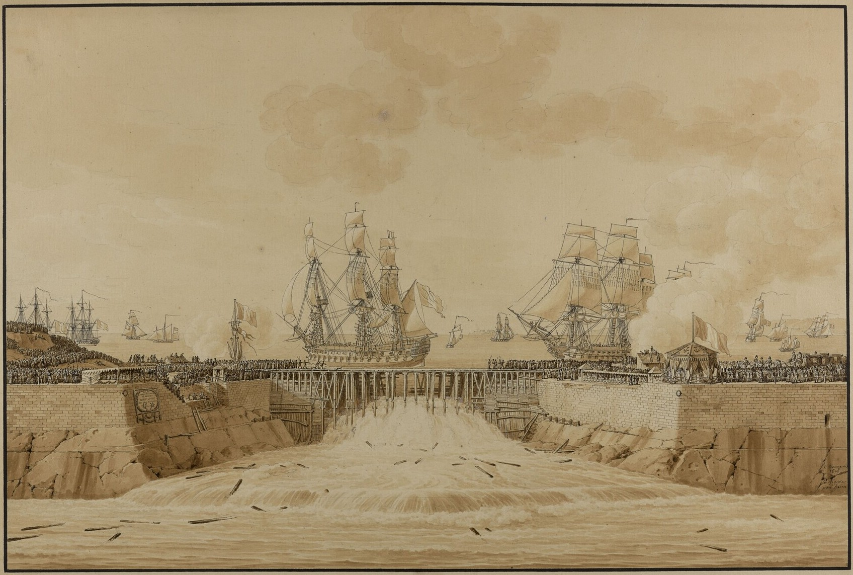 Immersion de l'avant-port de Cherbourg en présence de l'Impératrice Marie-Louise, 27 août 1813. Dessin. Dimensions : 39,9 x 55,2 cm, montage dessin : 52 x 73 x 0,7 cm. Matière et technique : plume et lavis d'encre et de bistre sur papier.